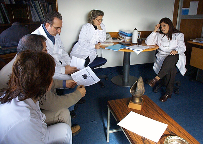 Reunión de la Dirección del INDT, Inés Alvarez con integrantes de su equipo de gestión